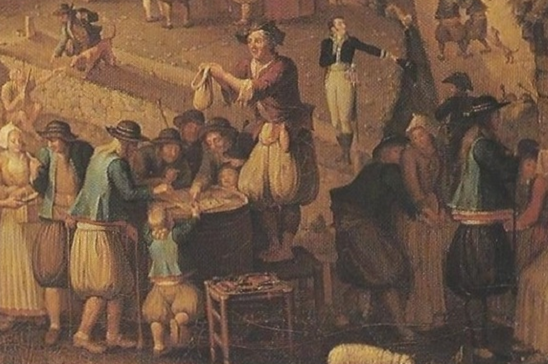 detail: costume masculin et d'enfant